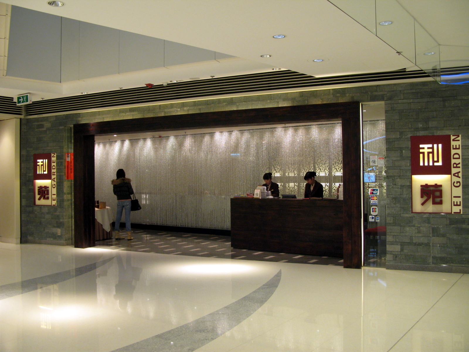 HK Lee Garden Restaurant in Elements Mall,Kowloon